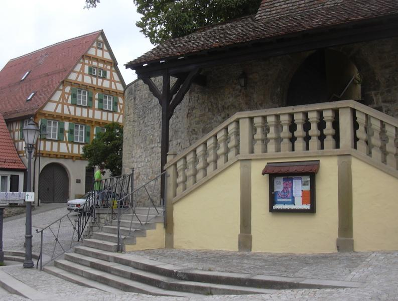 Frühmeßhaus und Aufgang zur Kirche in Schwieberdingen